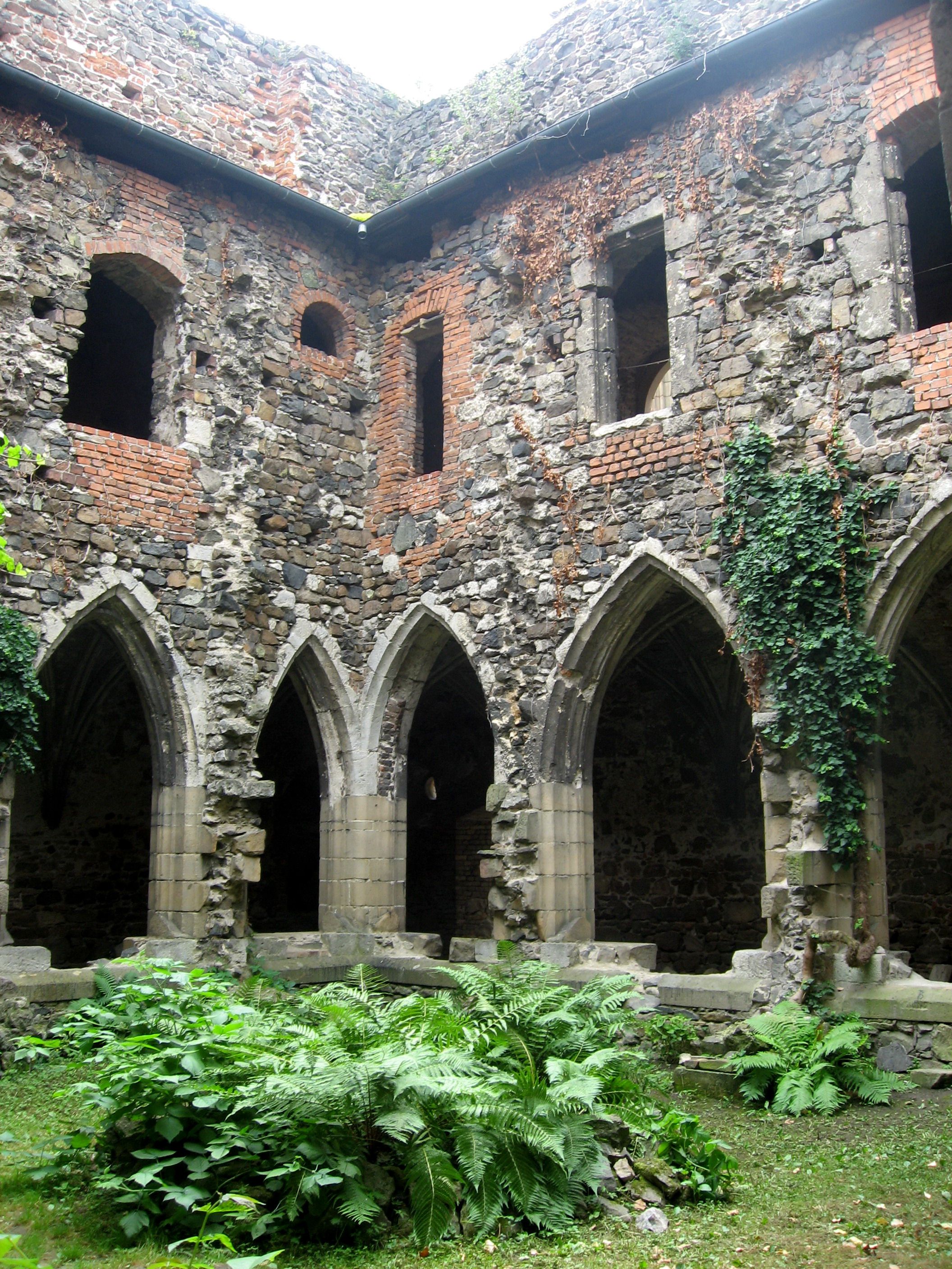 Zřícenina kláštera Rosa coeli